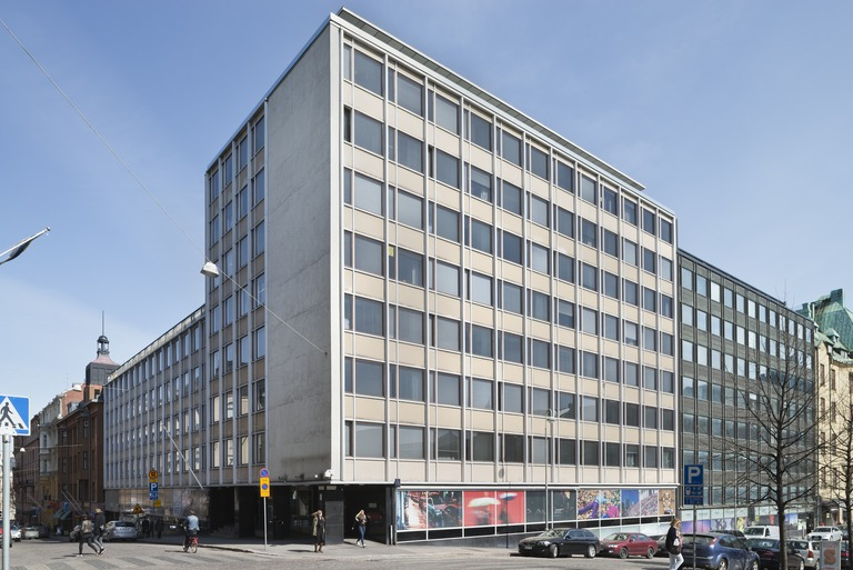 Rakennusvirasto, Kasarmikatu 21. Arkkitehti Lauri Pajamies, 1961. Purettu 2016.